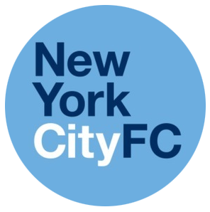 Logo officiel du New York City Football Club du 21 mai 2013, date d'officialisation de la franchise, au 20 mars 2014, date de dévoilement du nouveau logo.